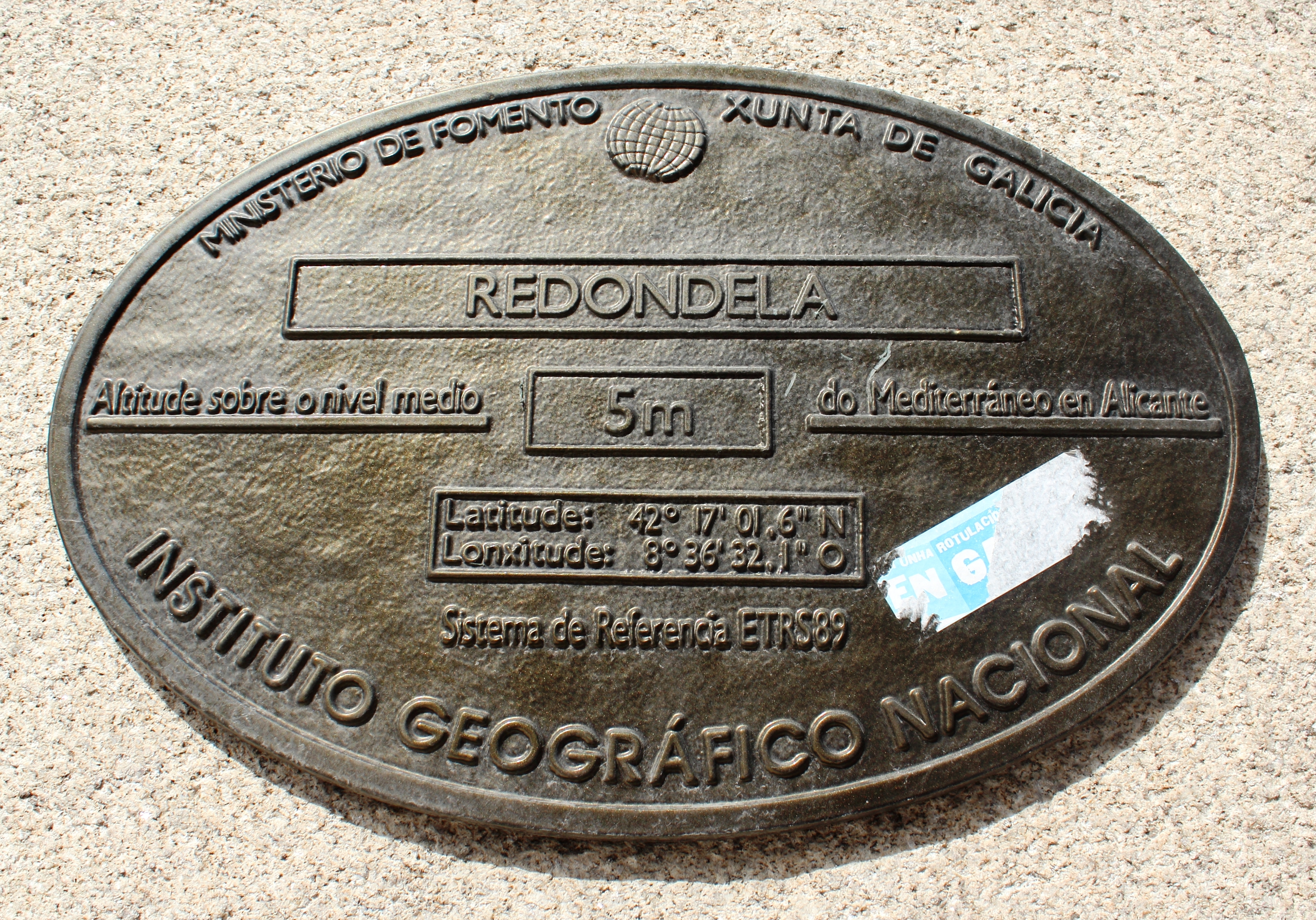 Placa altimétrica, Redondela.